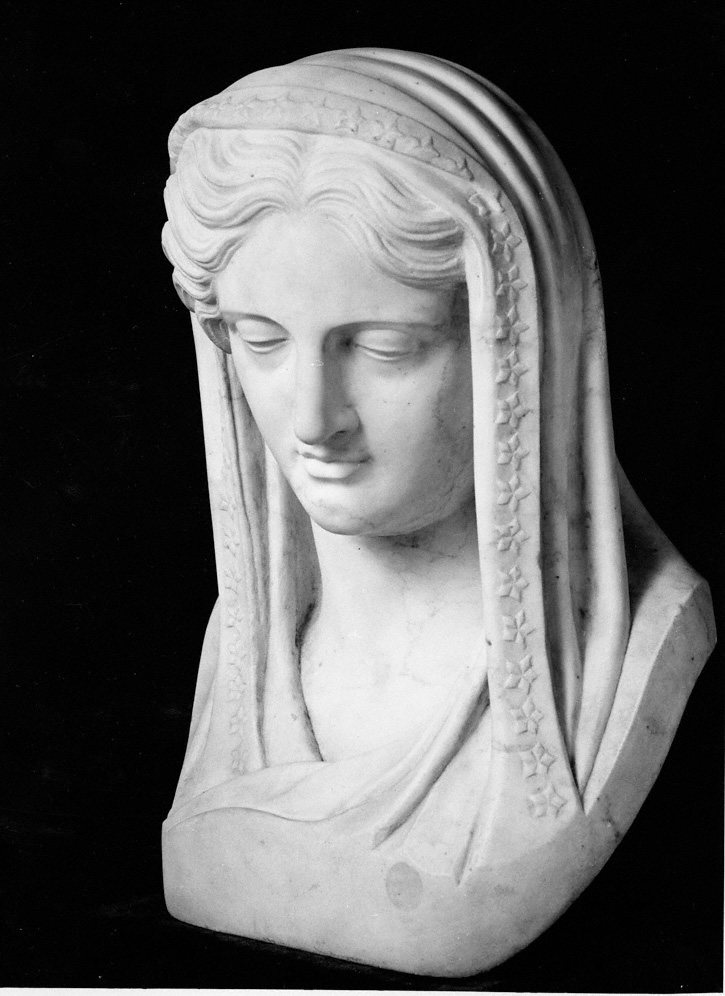 Η Νύχτα